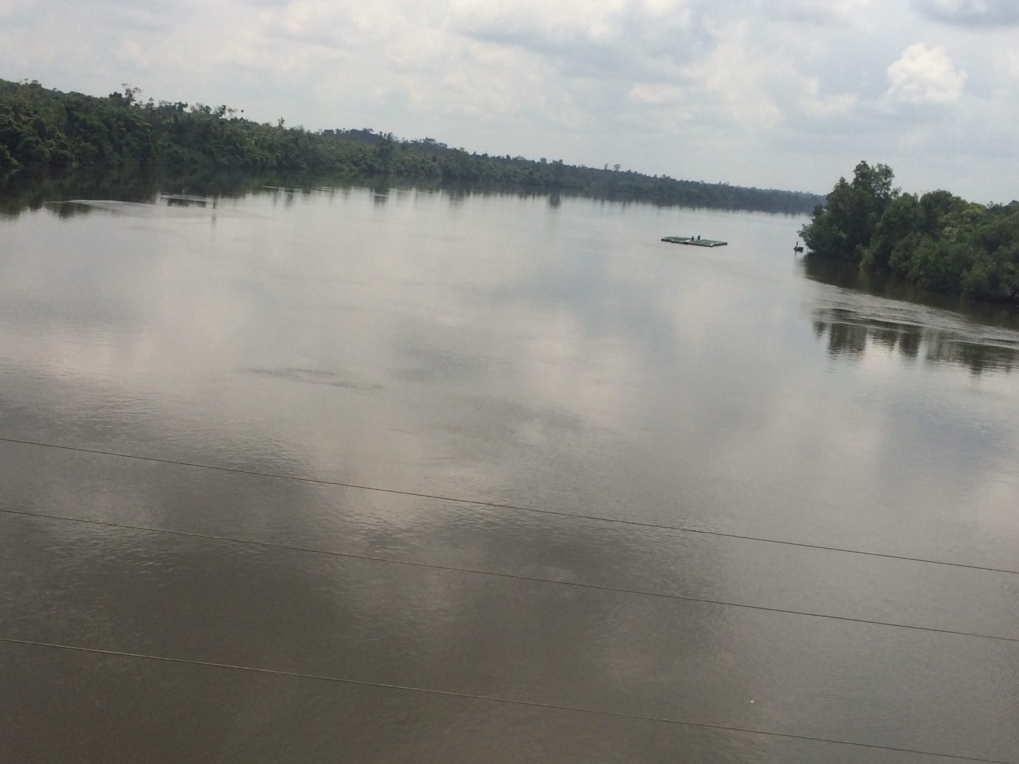 picture of River Wouri in Douala, Littoral Region, Cameroon